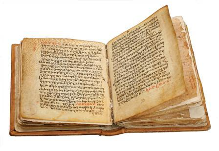 ჭილ-ეტრატის იადგარი